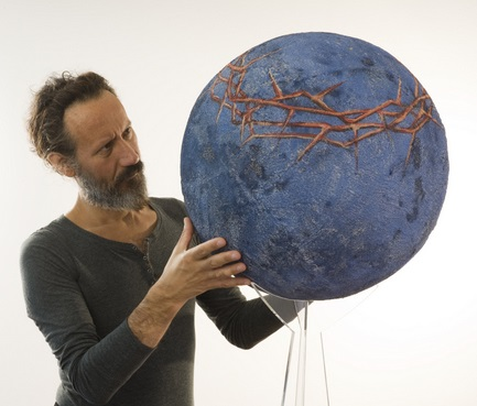 Francesco D'Alconzo con una delle sue opere, "Zoe"